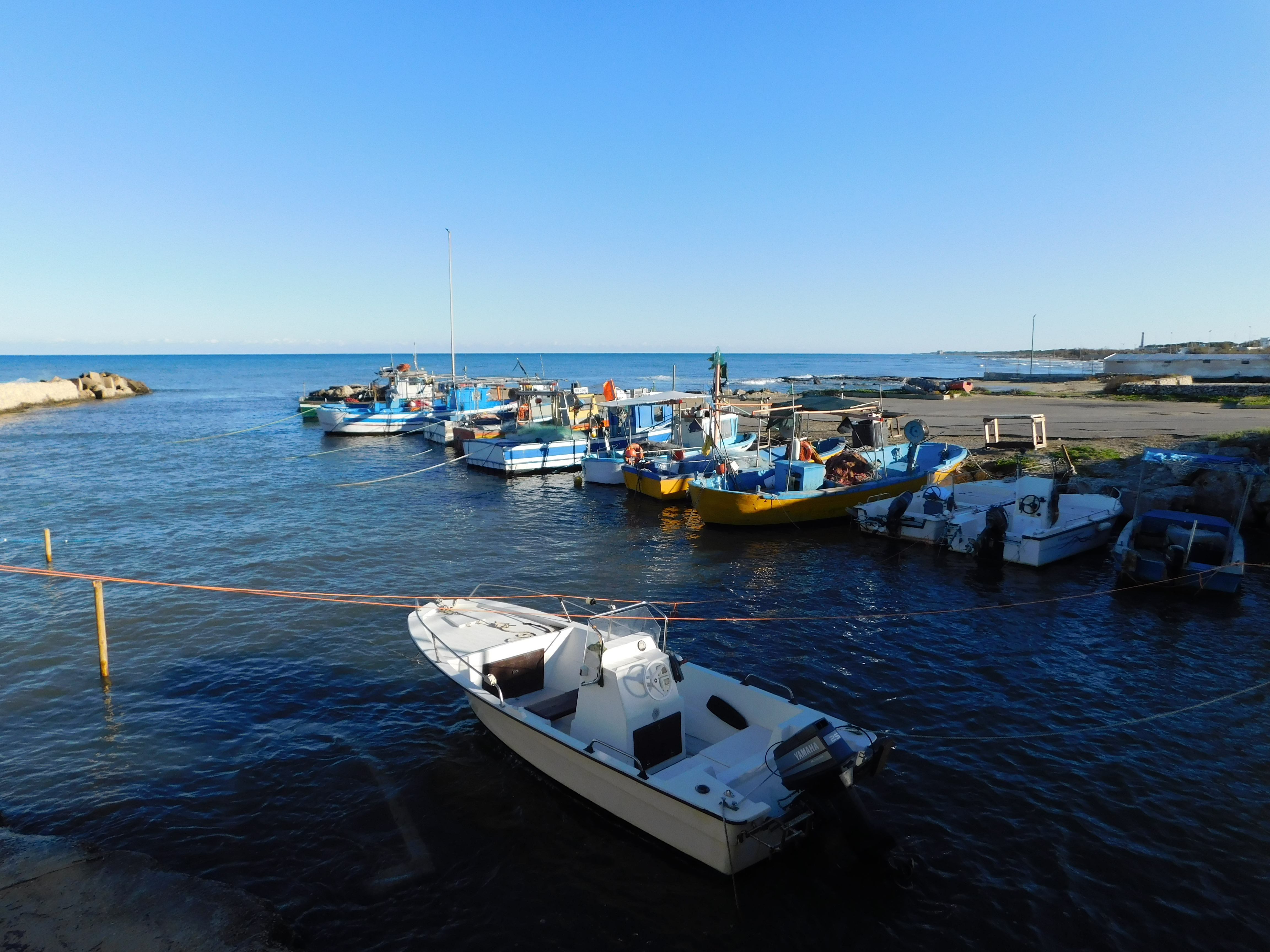 Un'immagine del porticciolo